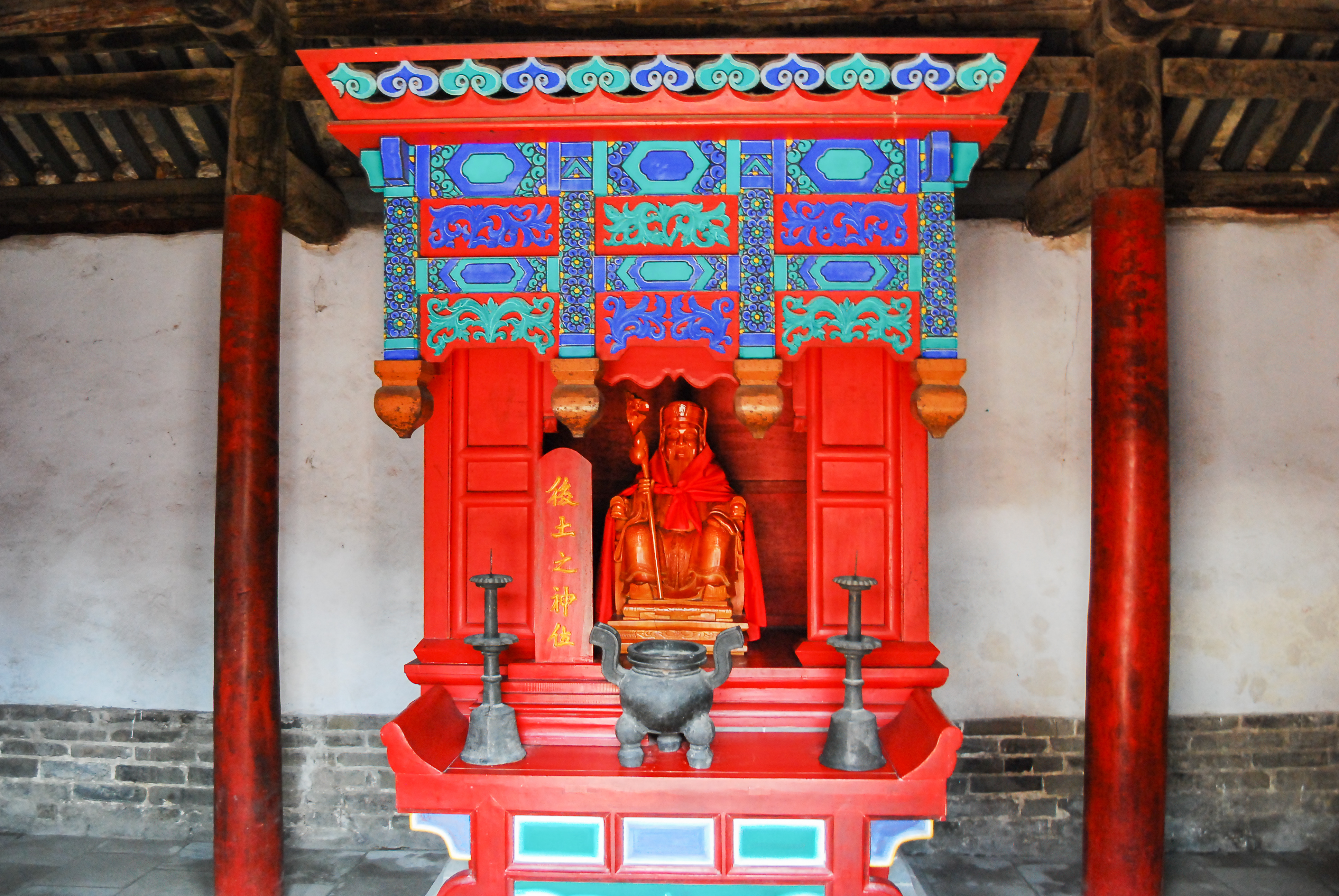 中文（中国大陆）: 曲阜孔府后土神位